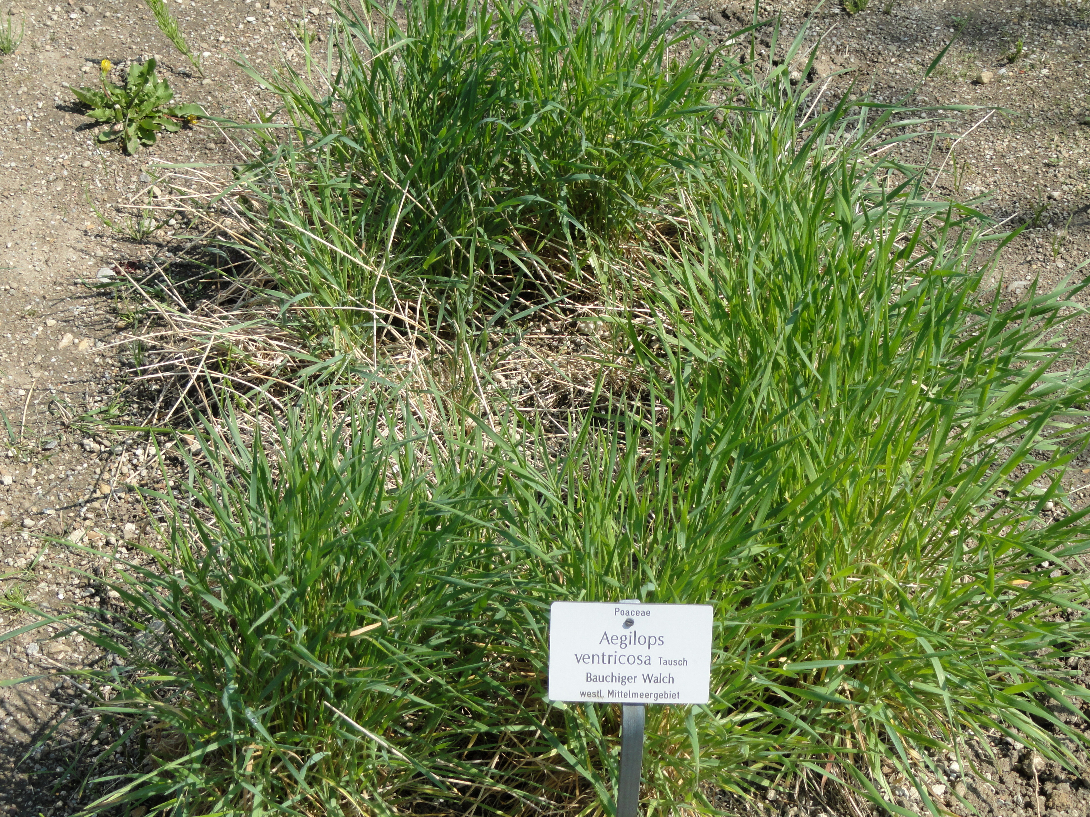 Aegilops ventricosa specimen in the Botanischer Garten München-Nymphenburg, Munich, Germany.